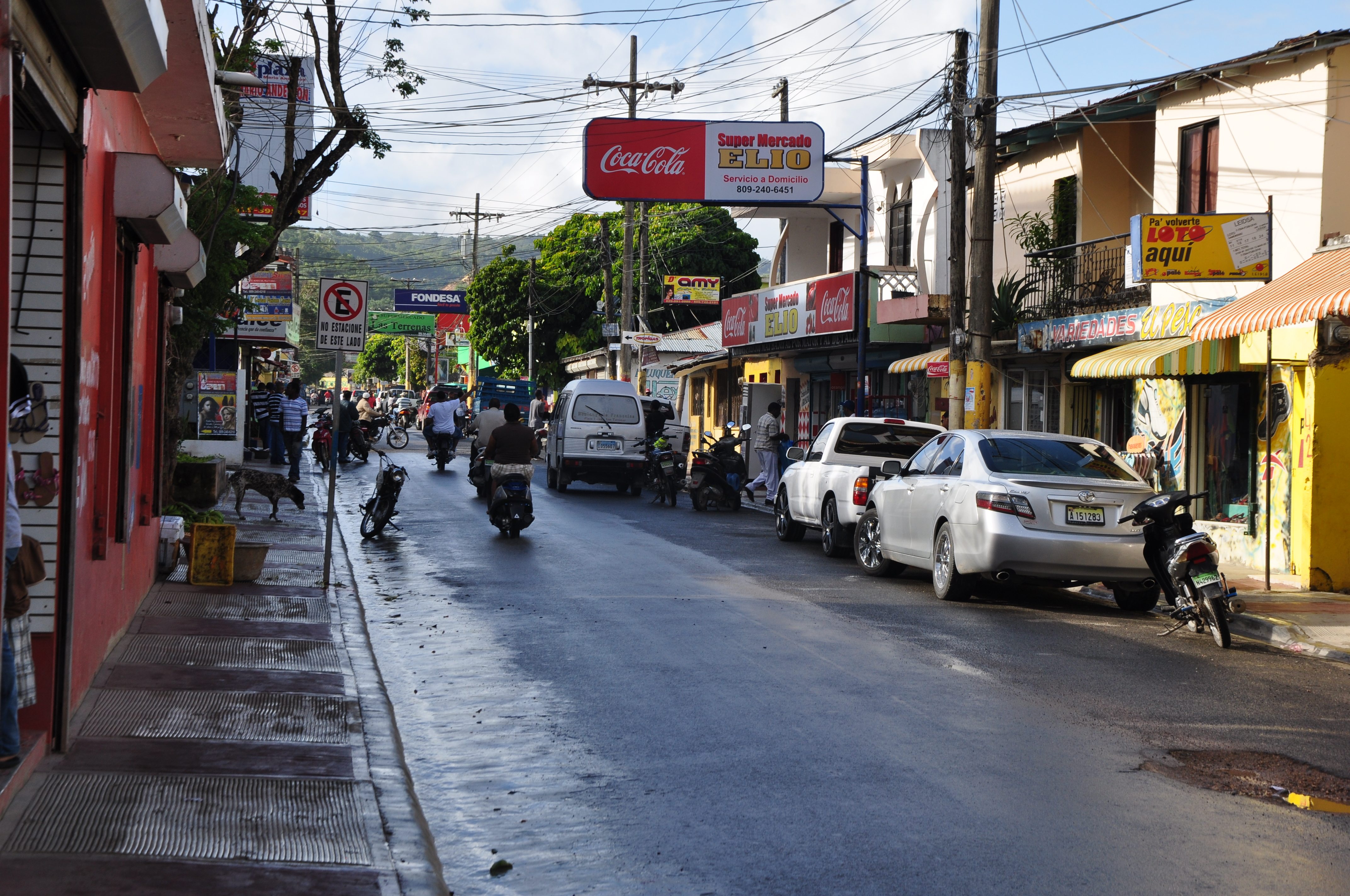 Las Terrenas, Samaná, Dominican Repúblic.